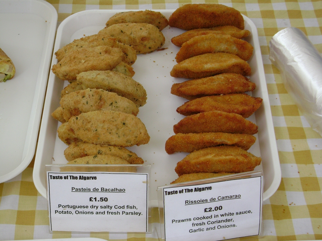 Tem até bolinho de bacalhau